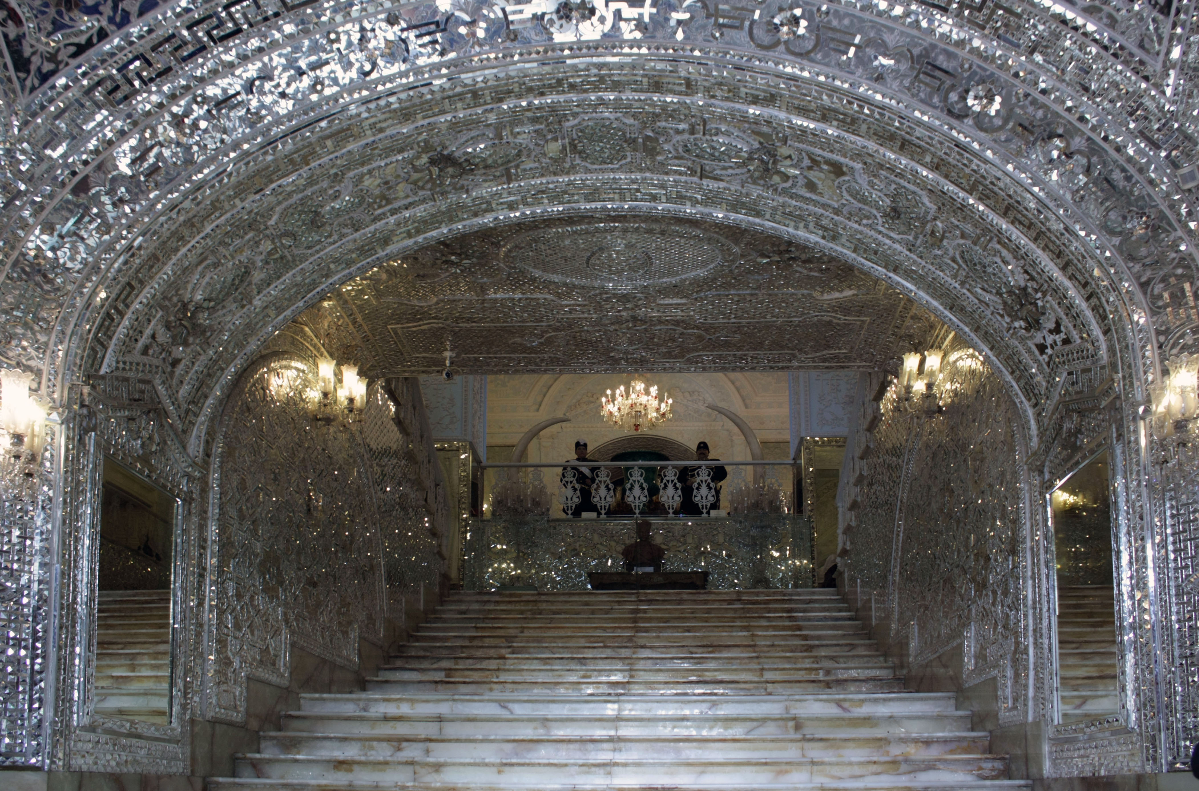 کاخ گلستان